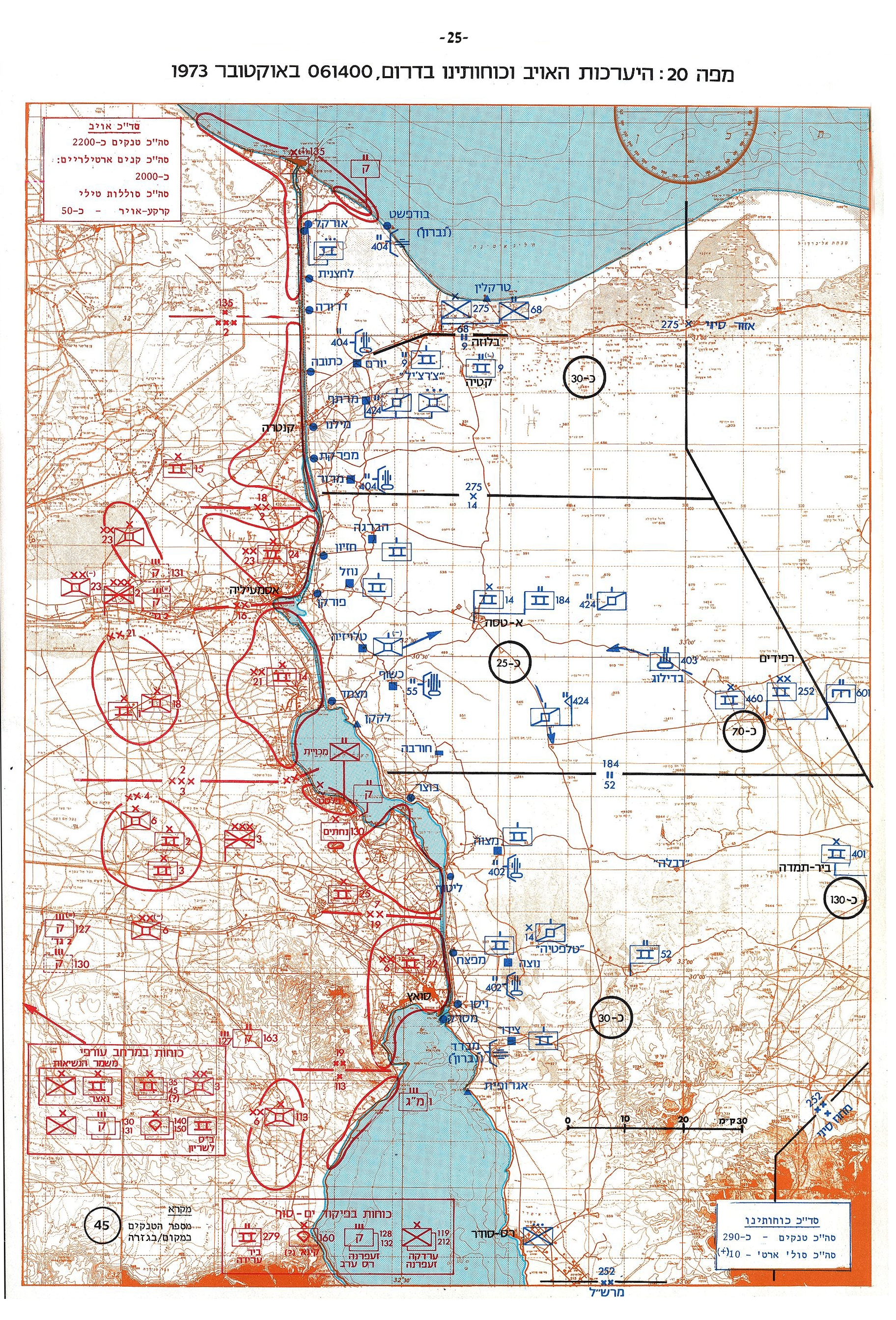 אטלס מלחמת יום הכיפורים. מפה 20 - הערכות האויב וכוחותינו בדרום, 6 באוקטובר 1973 בשעה 1400 - מלחמת יום הכיפורים